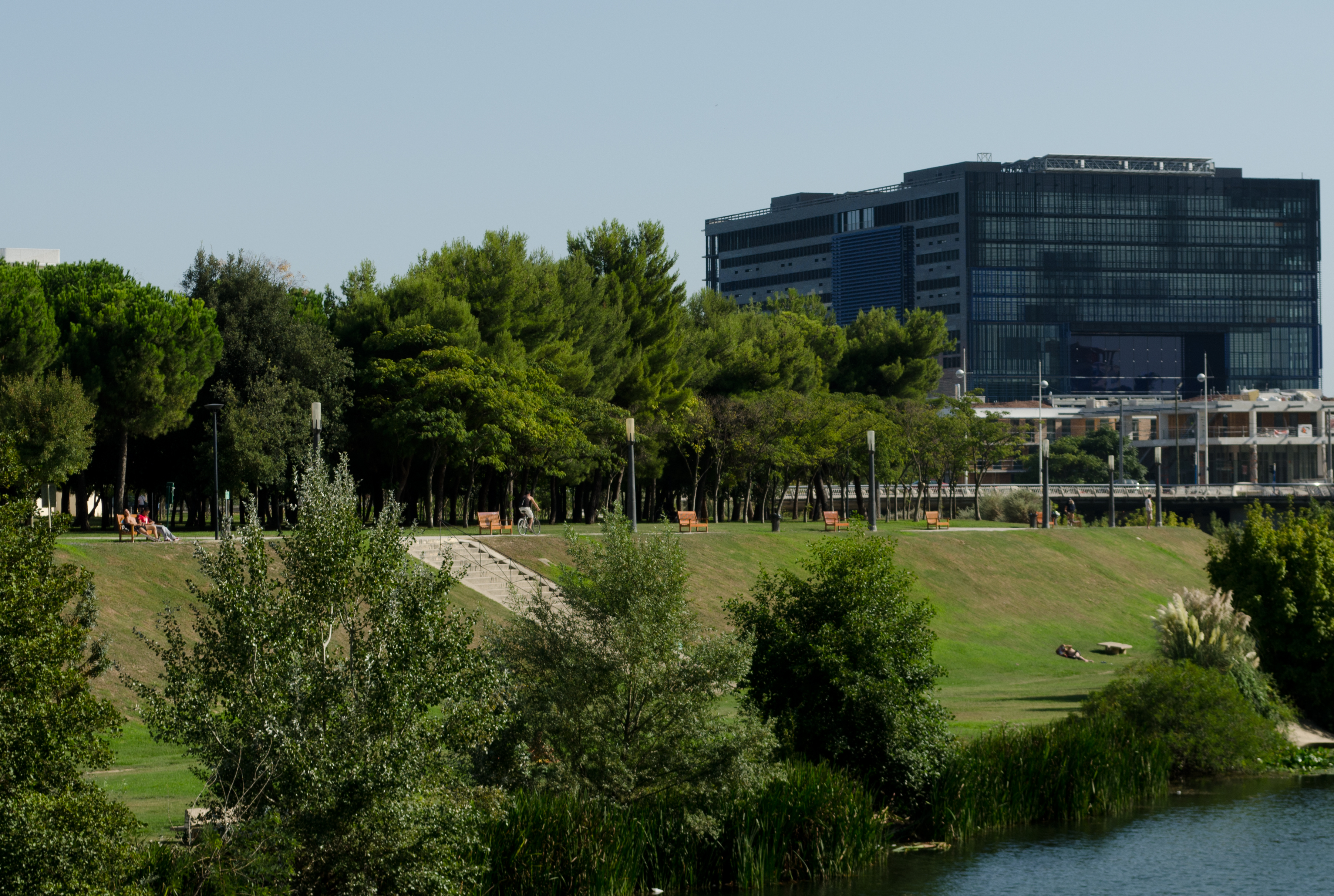 Nouvelle Mairie de Montpellier dans le quartier Port Marianne à Montpellier (Hérault).